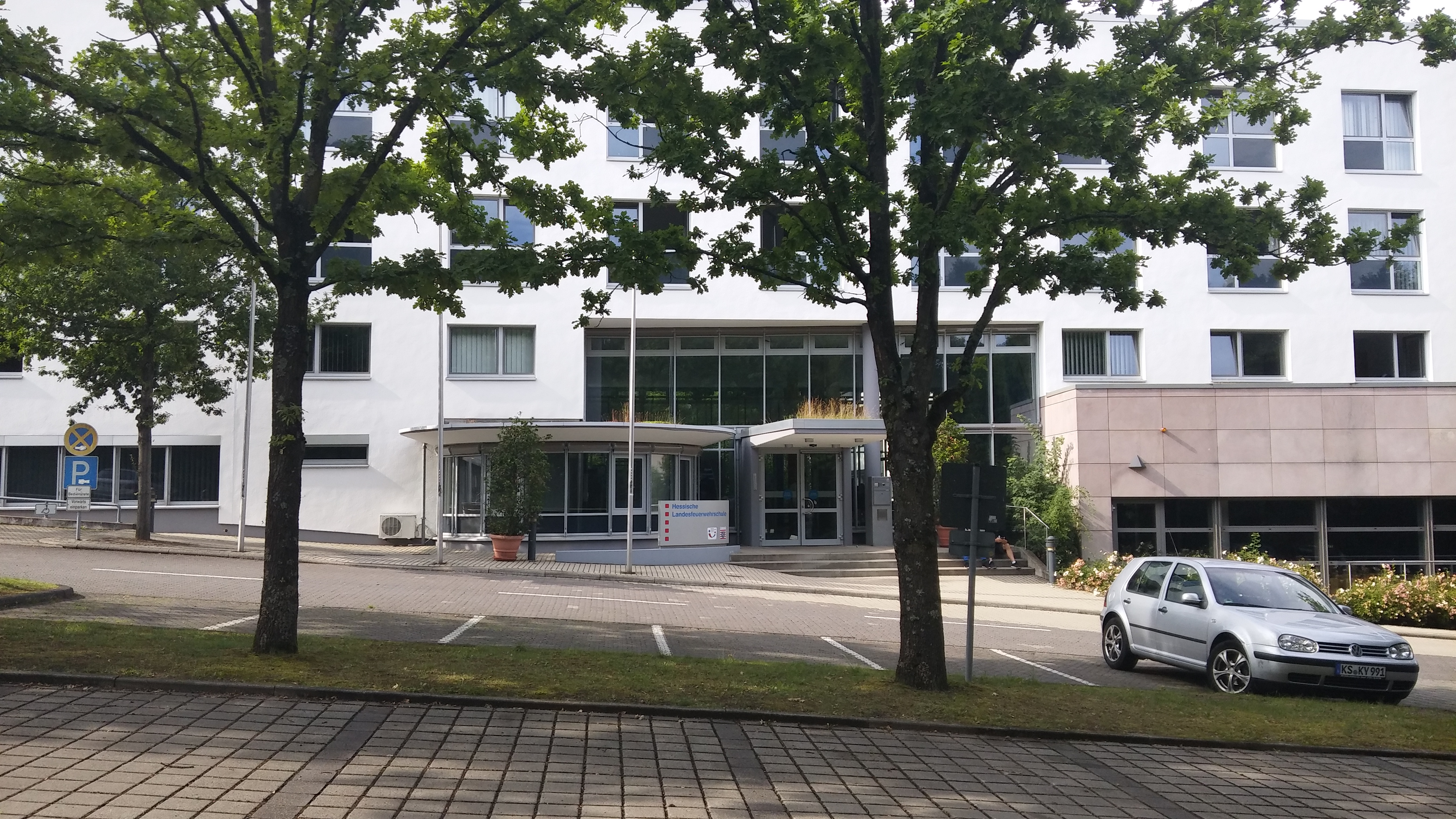 Neues Hauptgebäude mit Eingangsbereich